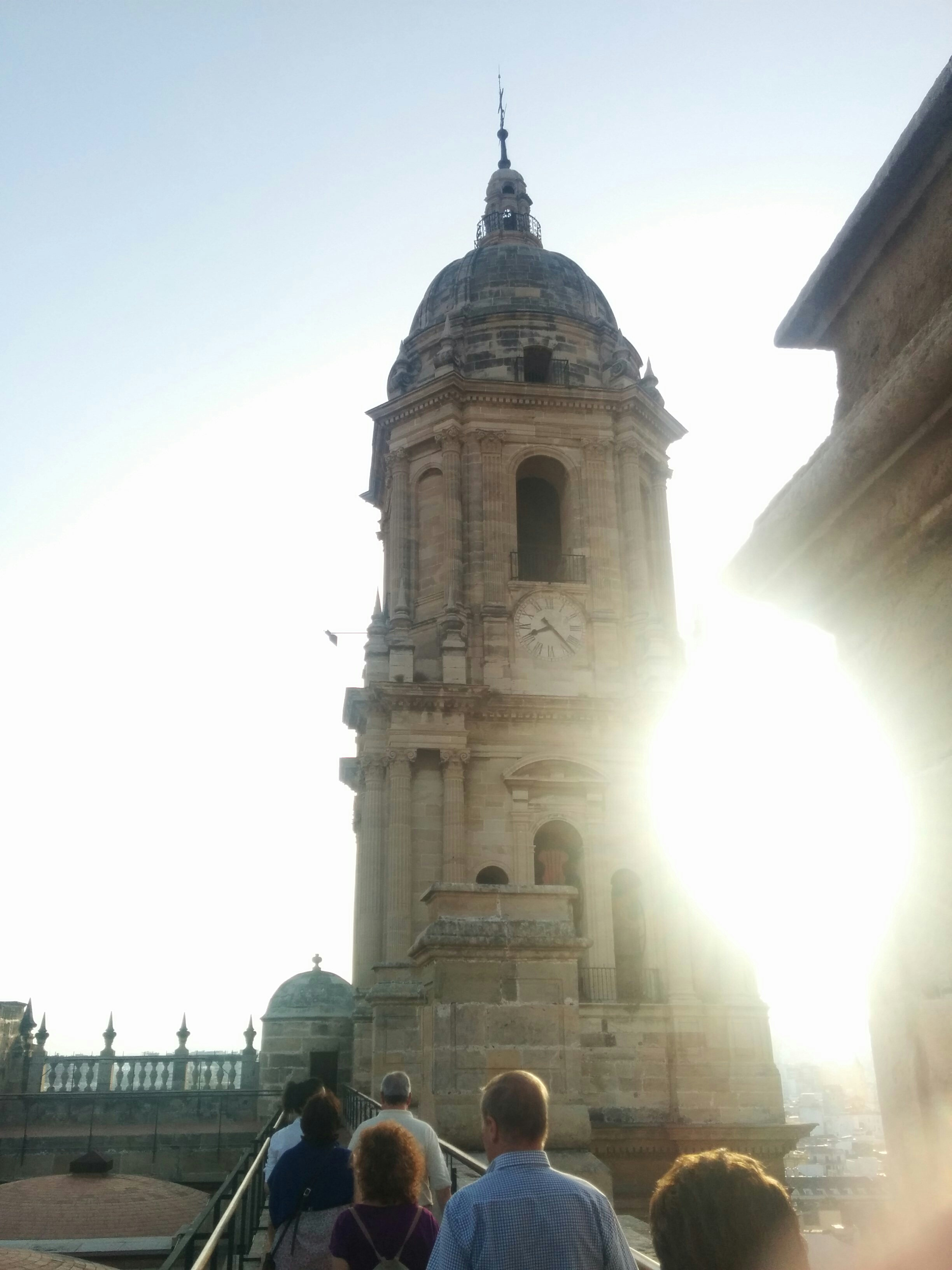 Cubiertas Catedral Málaga